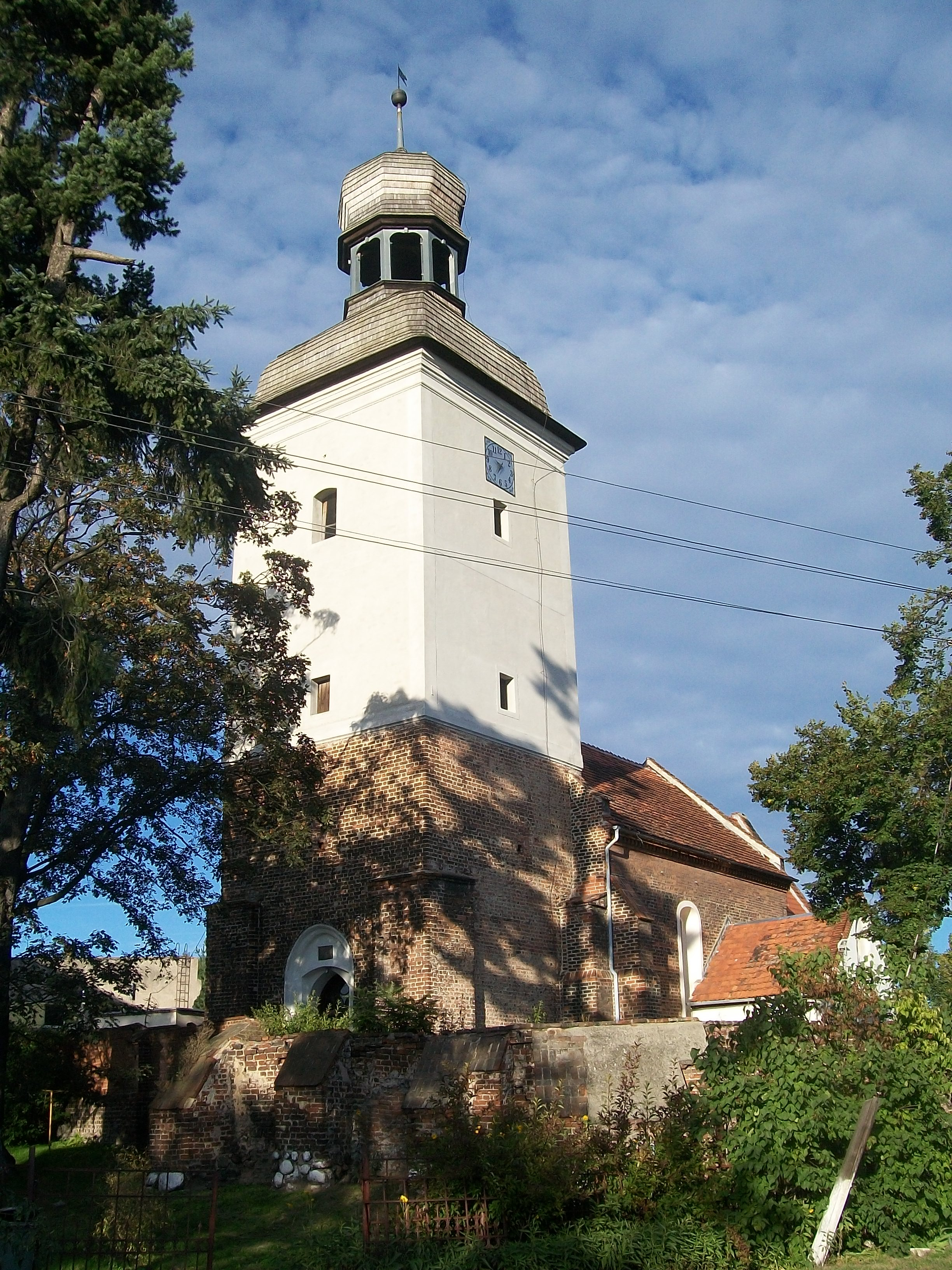 Strzelniki - kościół filialny p.w. św. Antoniego (zabytek nr 708/64 z 02.03.1964)